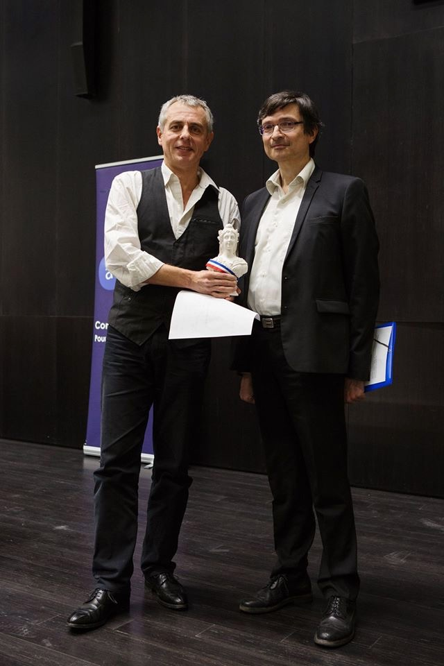 Nicolas Lambert et Eric Alt en 2020 à la remise du Prix Ethiques - Anticor